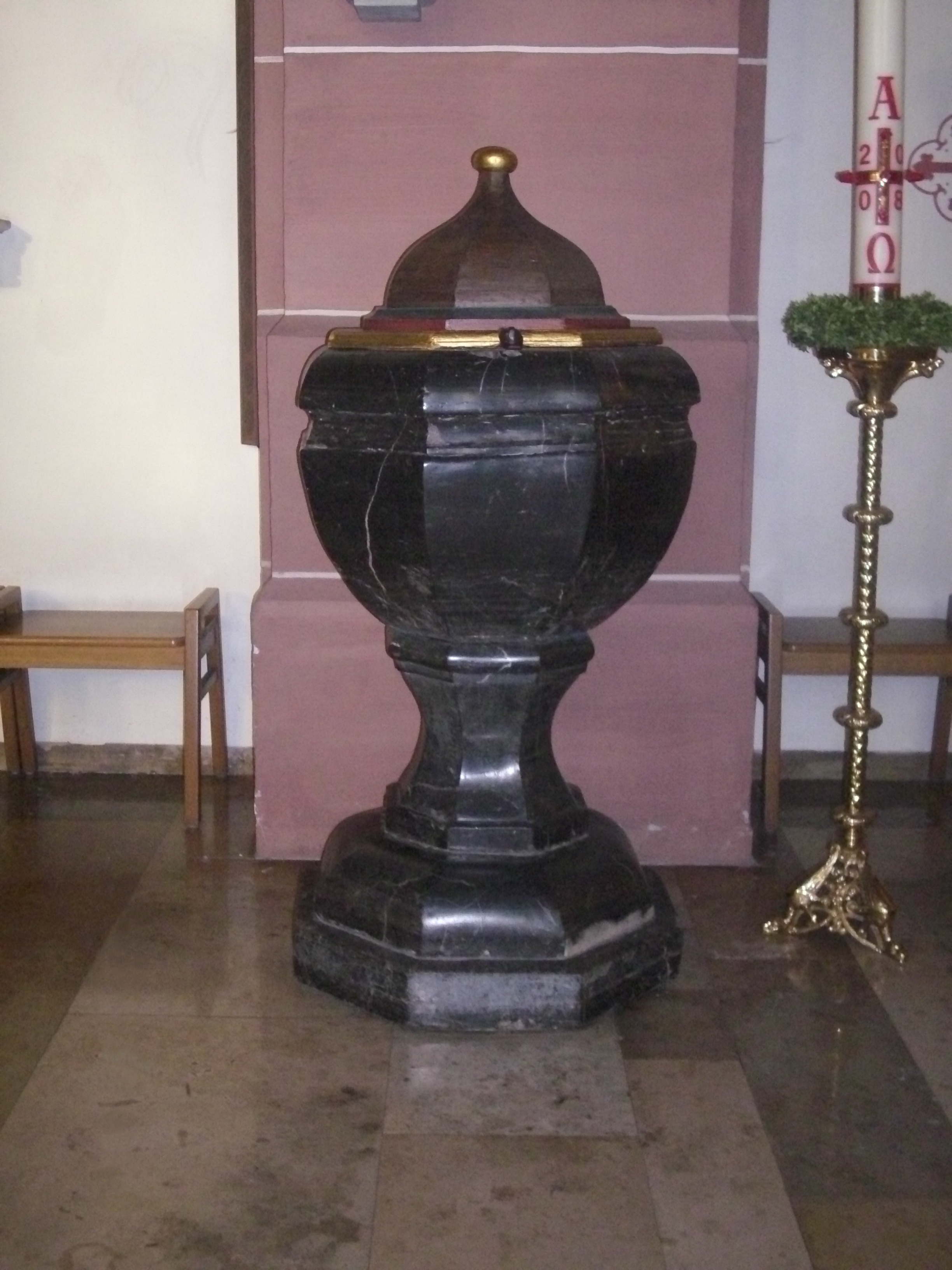 Taufstein in der katholischen Pfarrkirche in Medebach (Hochsauerlandkreis)